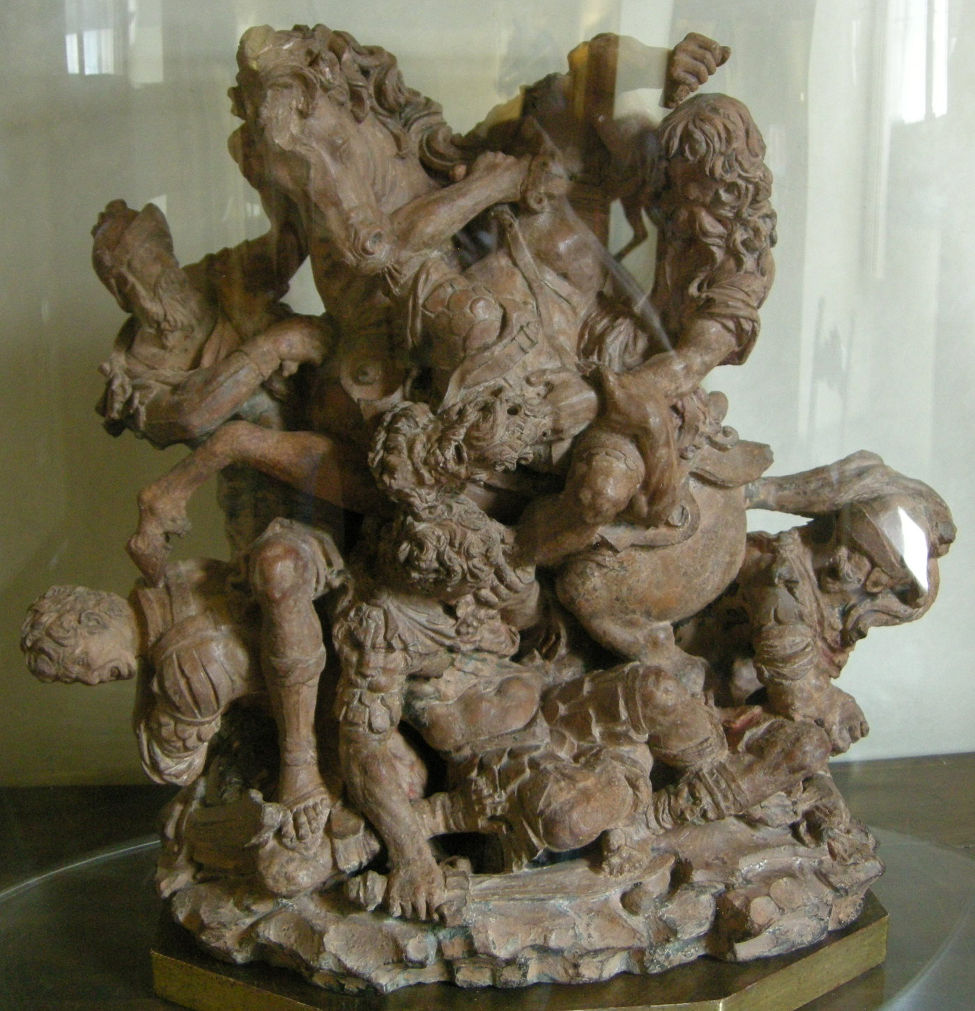 Collezione loeser, gruppo di guerrieri 1 di giovan francesco rustici